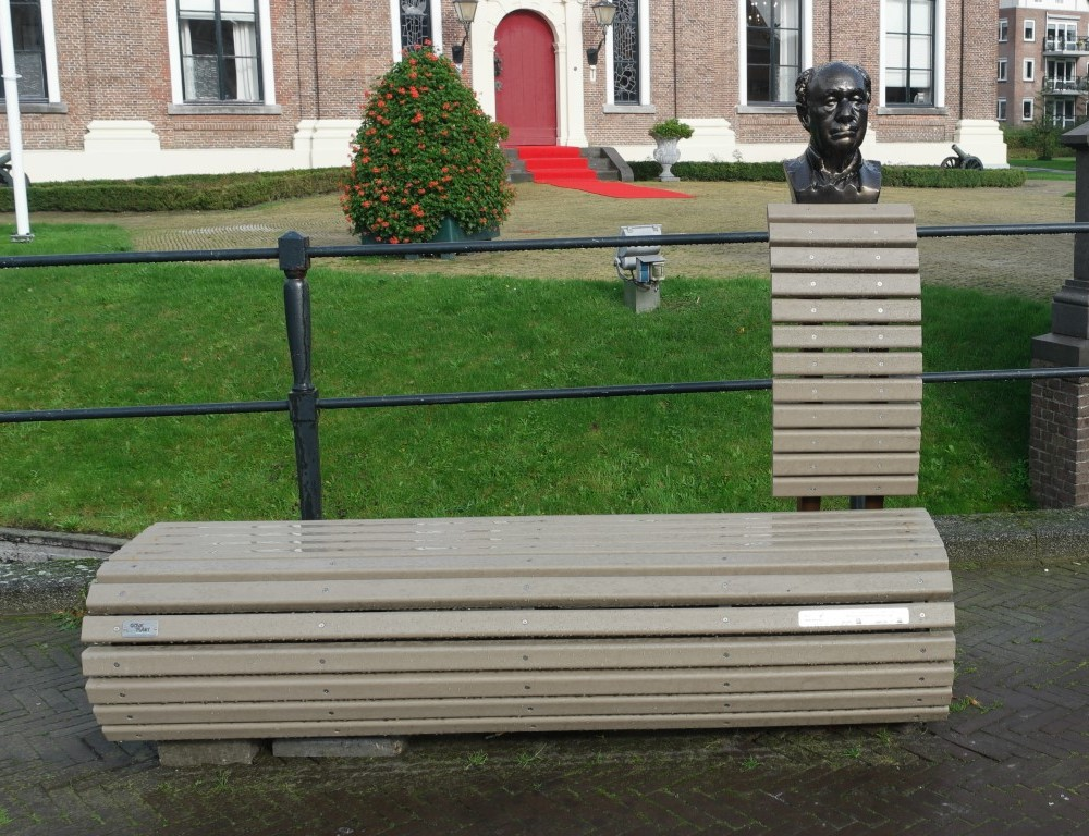 Walk of Fean - bankje beeld Riemer van der Velde bij Crackstate in de plaats Heerenveen